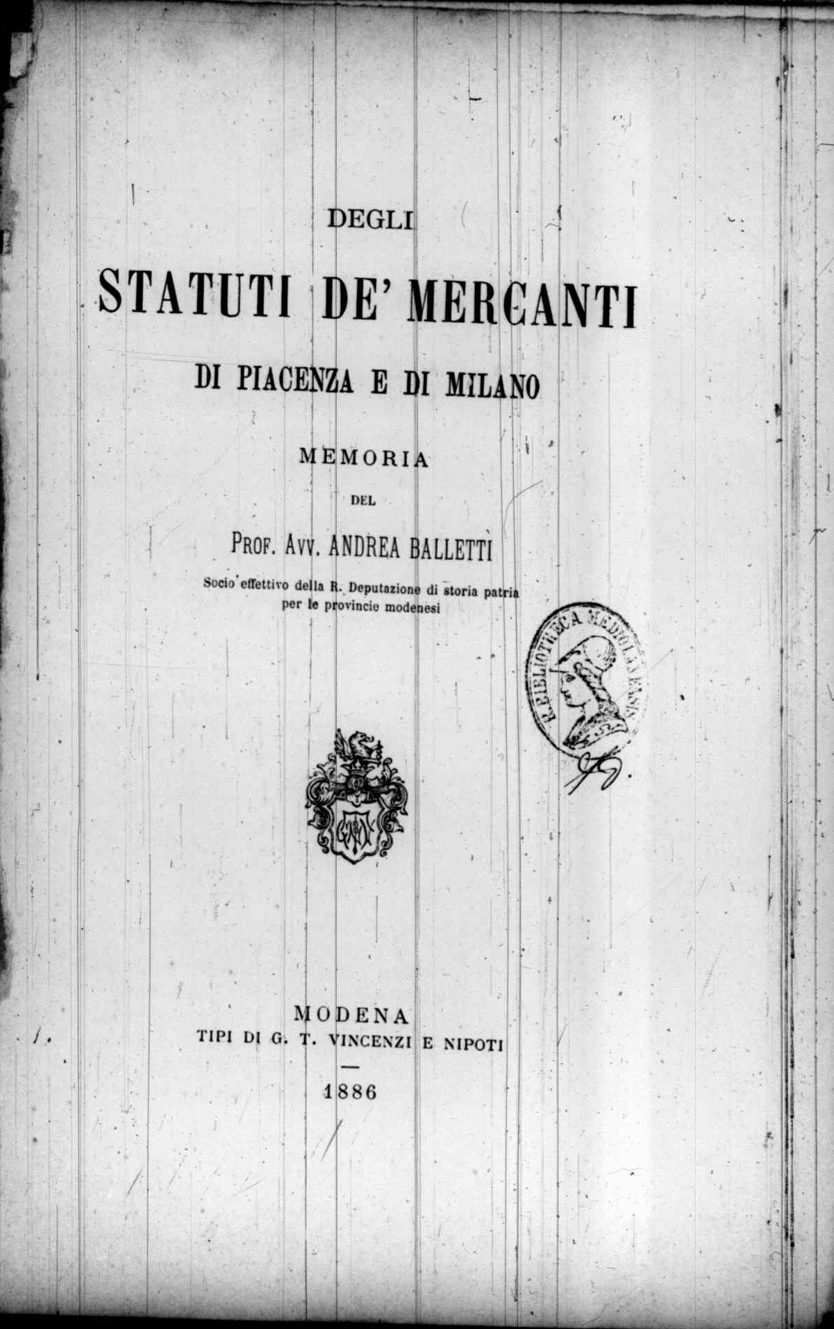 Frontespizio